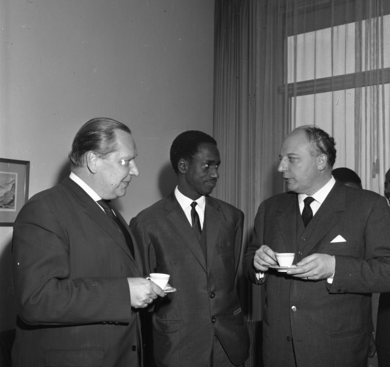 Empfang für den Wirtschaftsminister Ismael Touré aus Guinea im Hotel Königshof mit BM Walter Scheel (BMZ)